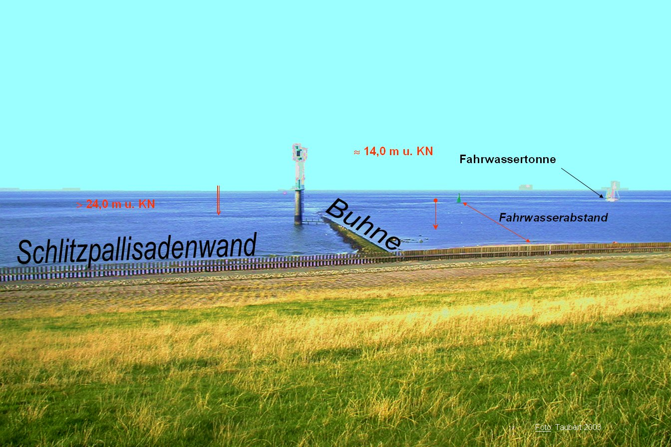 Glameyer Stack erläutert